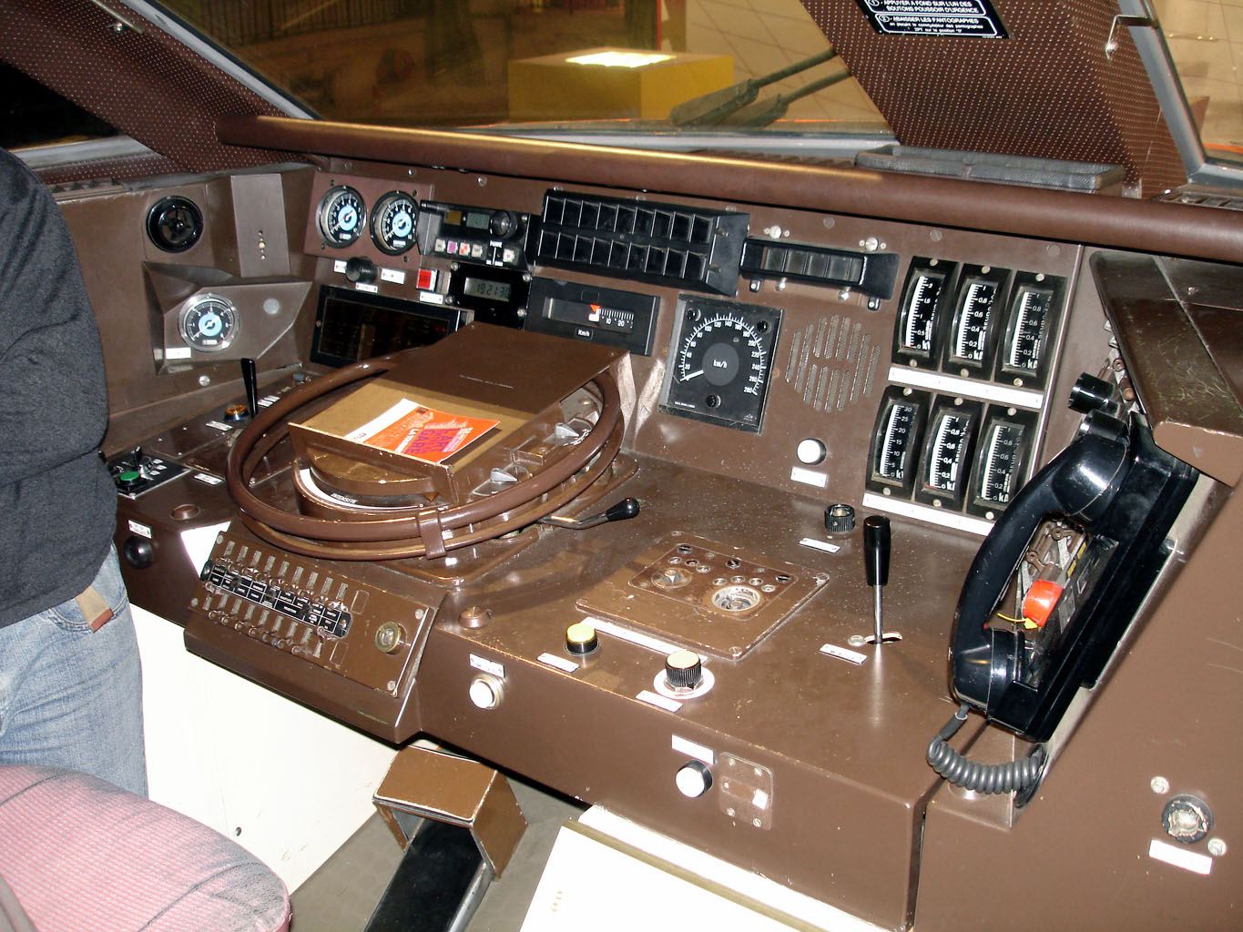 Cabine de la rame 16 du TGV Sud-Est, détentrice du record mondial de vitesse du 26 février 1981 à 380km/h Nef du Grand Palais à Paris, France Décembre 2007 Photo personnelle (own work) de Clicsouris